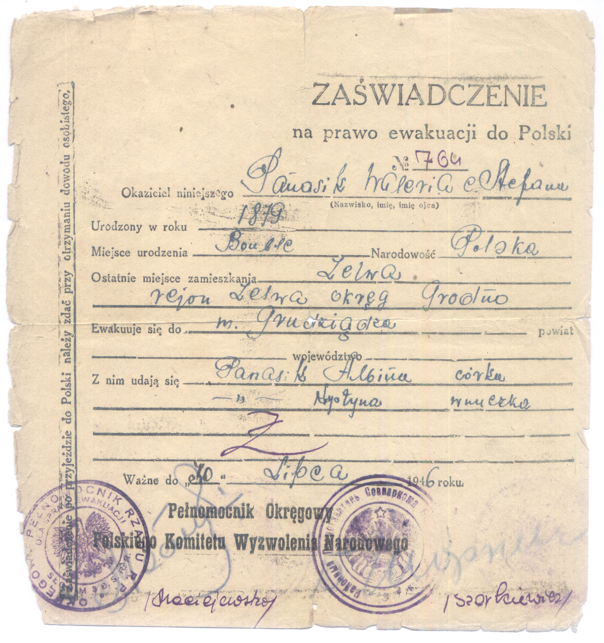 Zaświdczenie o ewakuacji do Polski